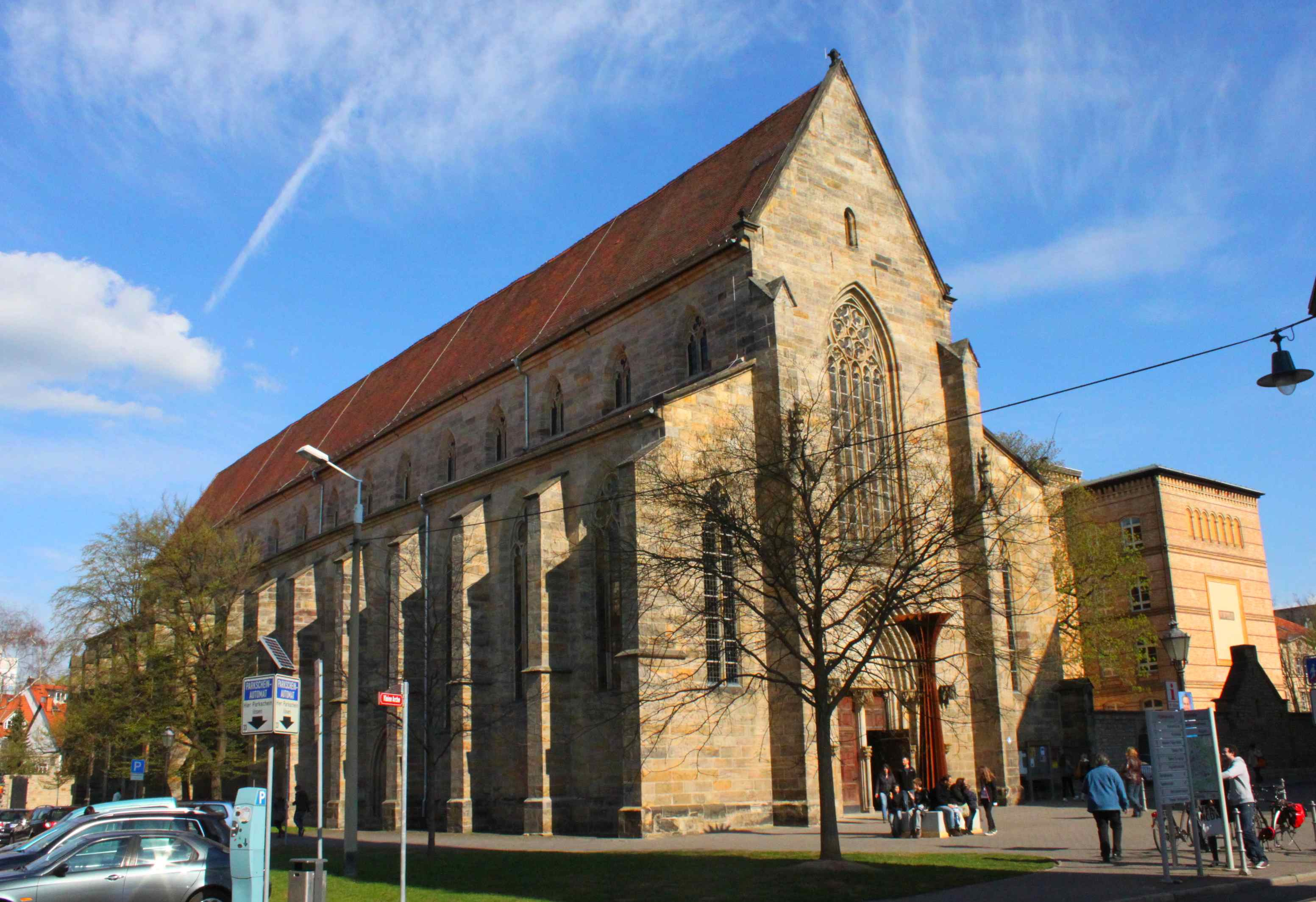 Die Predigerkirche wurde 1488 vollendet. Ehemalige Klosterkirche des Dominikanerordens mit bedeutenden Ausstattungsstücken des Mittelalters, seit 1525 evangelisch